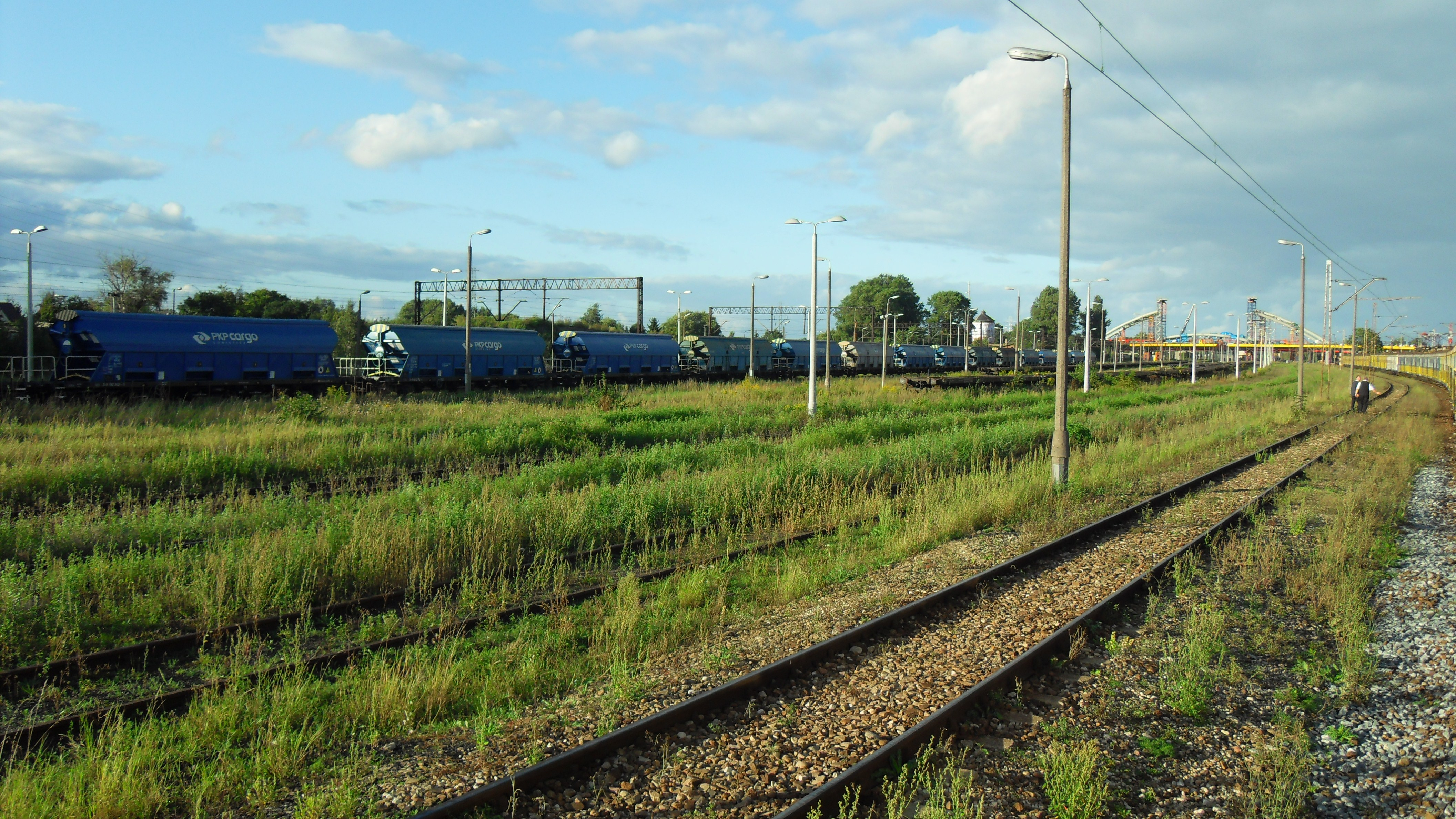 Gdańsk Wrzeszcz Dolny, stacja rozrządowa Gdańsk Zaspa Towarowa. Widok w kierunku północnym (w tle wiadukt ul. Uczniowskiej).